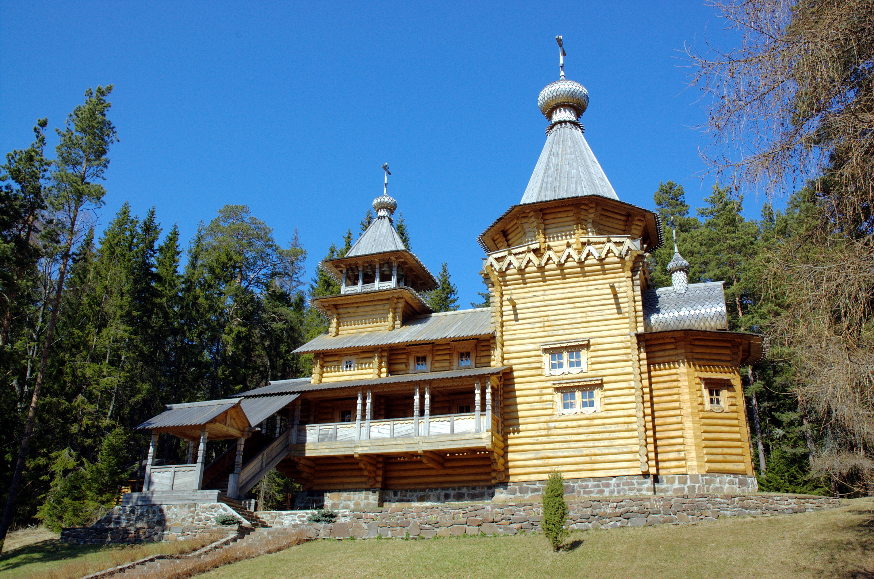 Ильинский скит Валаамского монастыря находится на одном из самых удаленных от основного монастыря островов из группы Байёвых (Байонных). Открыт в 1868 году. После советского разорения Ильинский храм был заново срублен в 2003 году архангелогородскими плотниками.